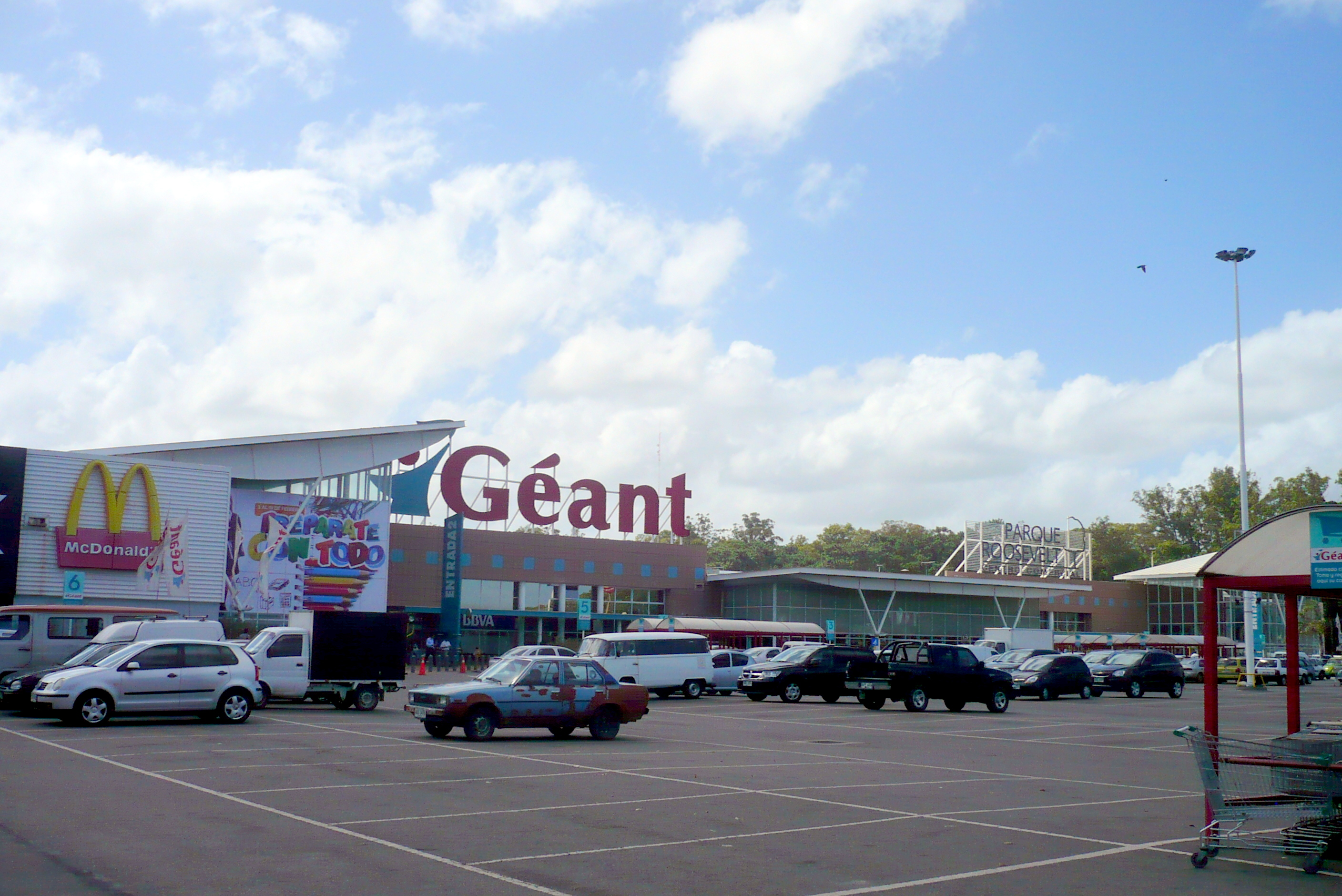 Supermercado Geant Parque Roosevelt - Ciudad de la Costa, Canelones, Uruguay